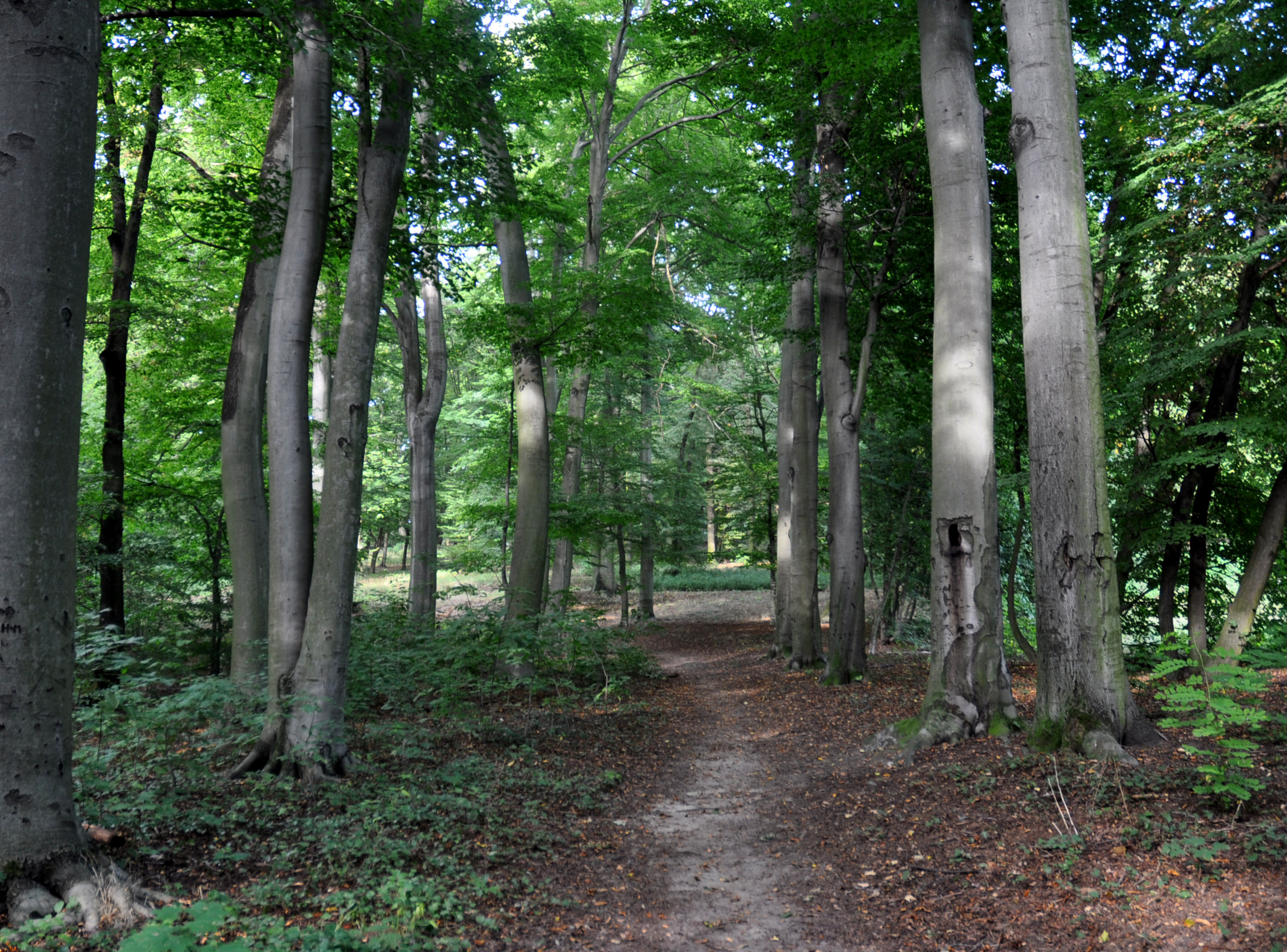 Buchenbestände am Böttcherberg im Park Klein-Glienicke